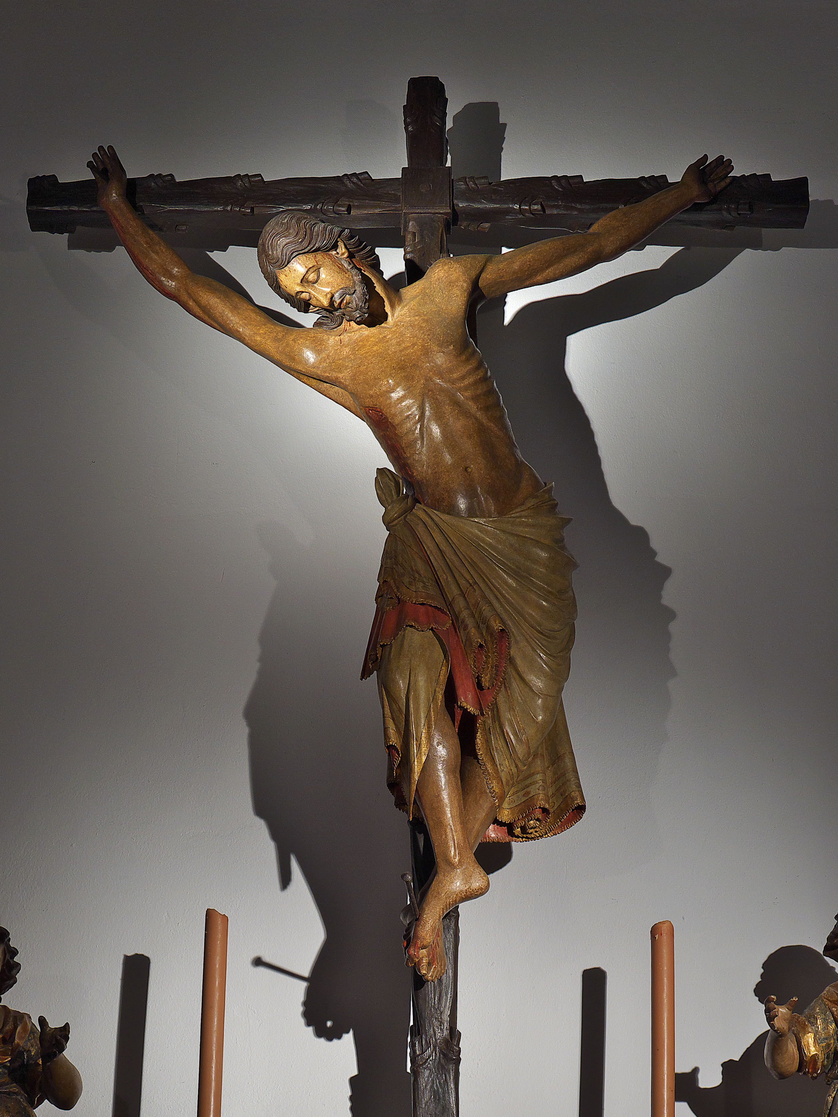 Iglesia de Santa María (Sanlúcar la Mayor). La escultura gótica más relevante en España del Crucificado en sus comienzos trecentistas. Segundo tercio del siglo XIV. Talla en madera policromada y dorada sobre cruz arbórea mediante tres clavos. Crucificado doloroso con acentuada y forzada disposición de piernas y pies, en el que destaca la asombrosa dulzura y serenidad de la muerte en su rostro. Es prototipo de un reducido número de notables ejemplares en la región. Procede de otra iglesia sanluqueña, San Pedro.